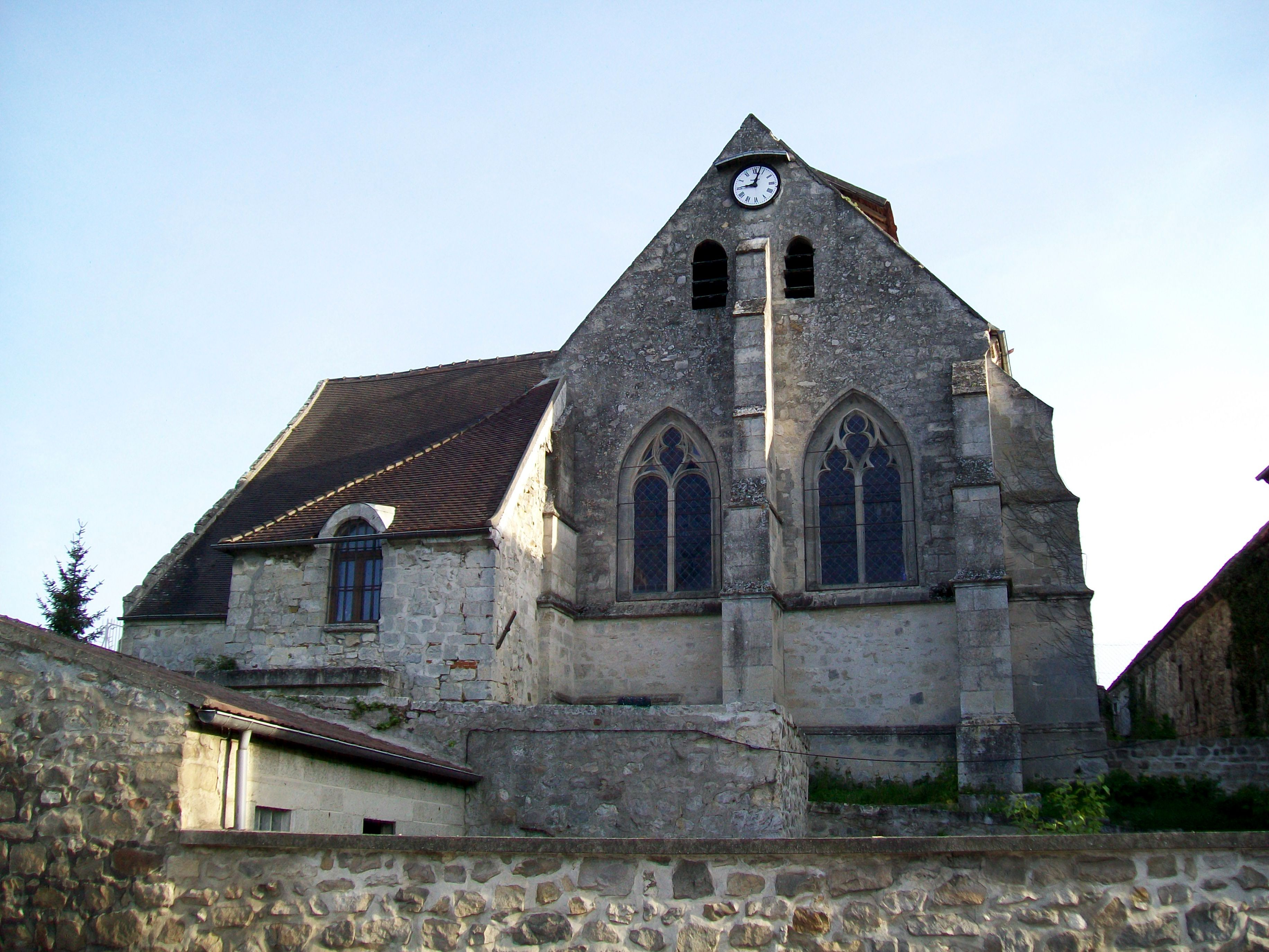 L'église d'Ormoy-Villers, d'un plan inhabituel : pas de clocher, le transept (photo) est plus grand que la nef et il n'y a pas de chevet. En outre, le presbytère est accolé à l'église.